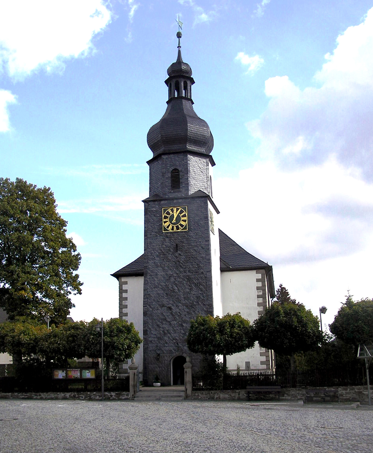 Description: Evangelisch-lutherische Pfarrkirche in Konradsreuth, Landkreis Hof, Oberfranken Source:Fotografiert am 3. Oktober 2004 Author: Schubbay